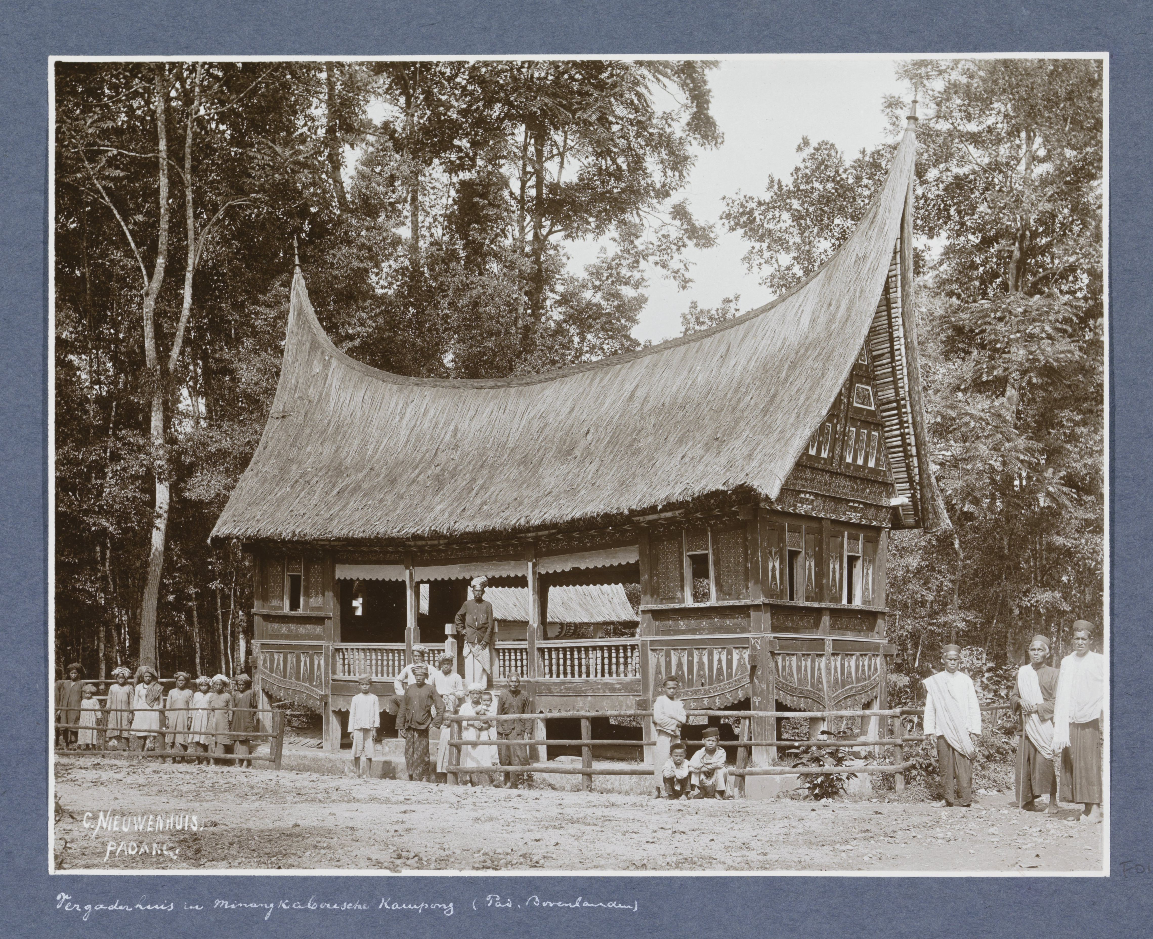 IdentificatieTitel(s): Indische mannen en kinderen poserend voor een vergaderhuis in Minangkabou op SumatraObjecttype: foto albumblad Objectnummer: RP-F-F01149-DCOmschrijving: Onderdeel van Reisalbum met foto's van bedrijvigheid en beziensWaar: digheden op Sumatra en Java en van de reis naar en van Nederlands-Indië.VervaardigingVervaardiger: fotograaf: Christiaan Benjamin NieuwenhuisPlaats vervaardiging: SumatraDatering: ca. 1900 - ca. 1920Fysieke kenmerken: ontwikkelgelatinezilverdrukMateriaal: papier fotopapier Techniek: ontwikkelgelatinezilverdrukAfmetingen: foto: h 223 mm × b 290 mmOnderwerpWat: façade (of house or building)exterior ~ representation of a buildingWaarSumatraVerwerving en rechtenVerwerving: overdracht van beheer 1994Copyright: Publiek domein